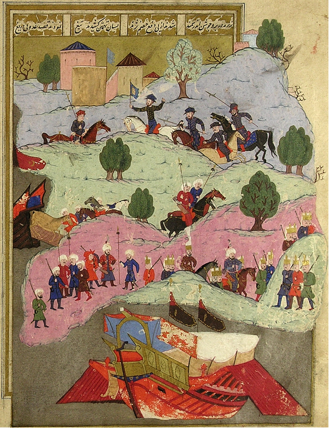 Osmanlı donanmasının Kıbrıs’ta Limasol koyunda demirleyerek karaya asker çıkarması ve minyatürden ayrıntıda belirtilen, teknenin içinden atların karaya çıkartılması.Geminin seren direkleri sökülmüş gemicilerin ferahlaması için üstlerine beyaz çarşaf veya branda serilmiştir. Seyis’in at sevgisini ve atın boynuna sarılması ayrı güzel bir detaydır.